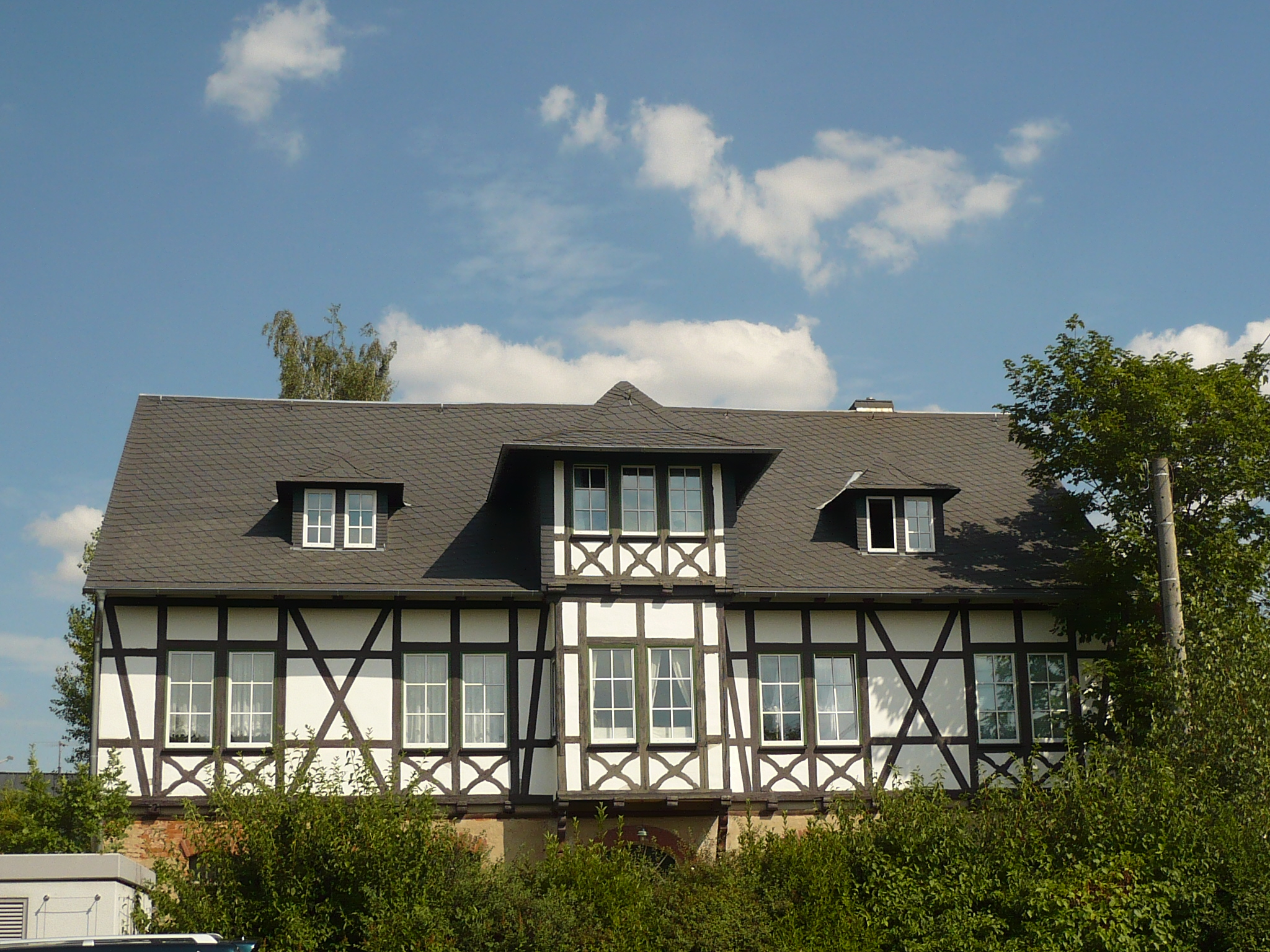 Herrenhaus des ehemaligen Ritterguts Schweinsburg (Neukirchen/Pleiße)